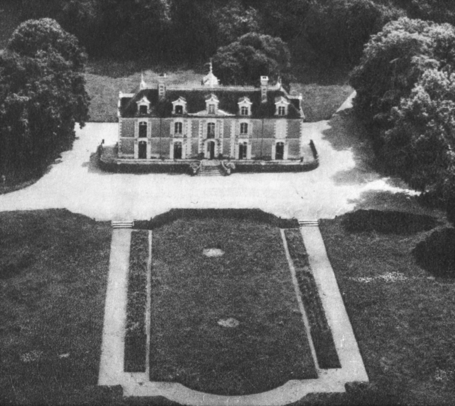 Carte postale, vue du château de la Violette et son parc, situé à Grez-Neuville dans le département de Maine-et-Loire, en France.